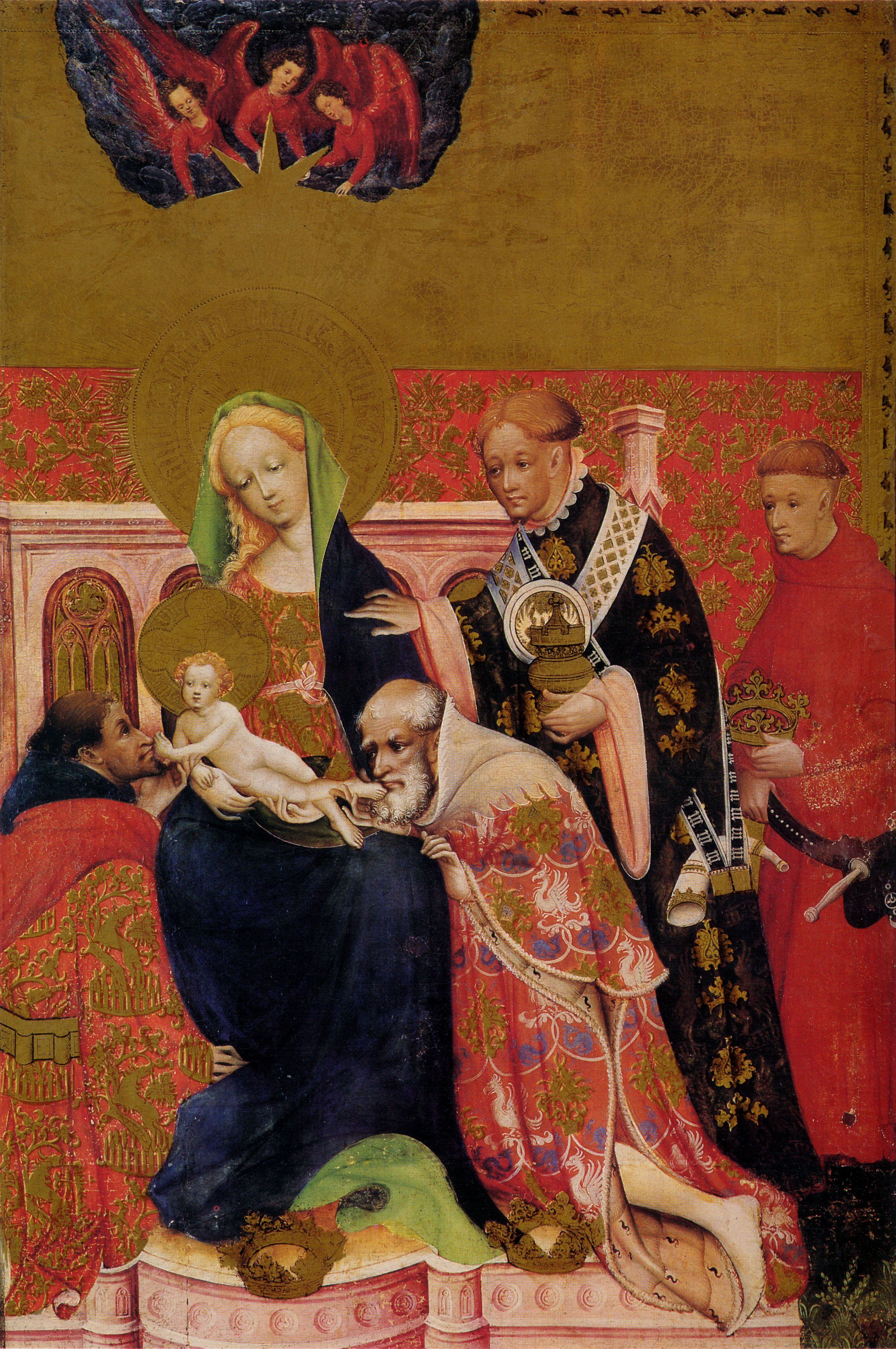 Marienkirche Dortmund - Marienalter - Rechte Tafel